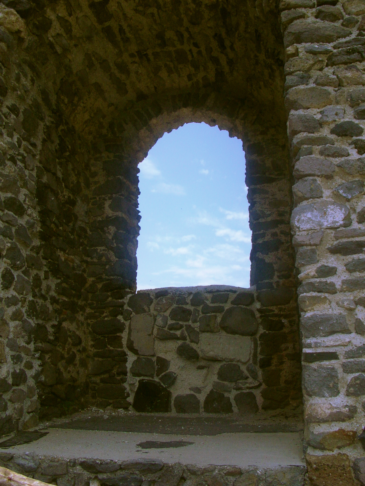 Saját művem, közkincsnek ajánlom. Témája: Somlói vár őrtornya